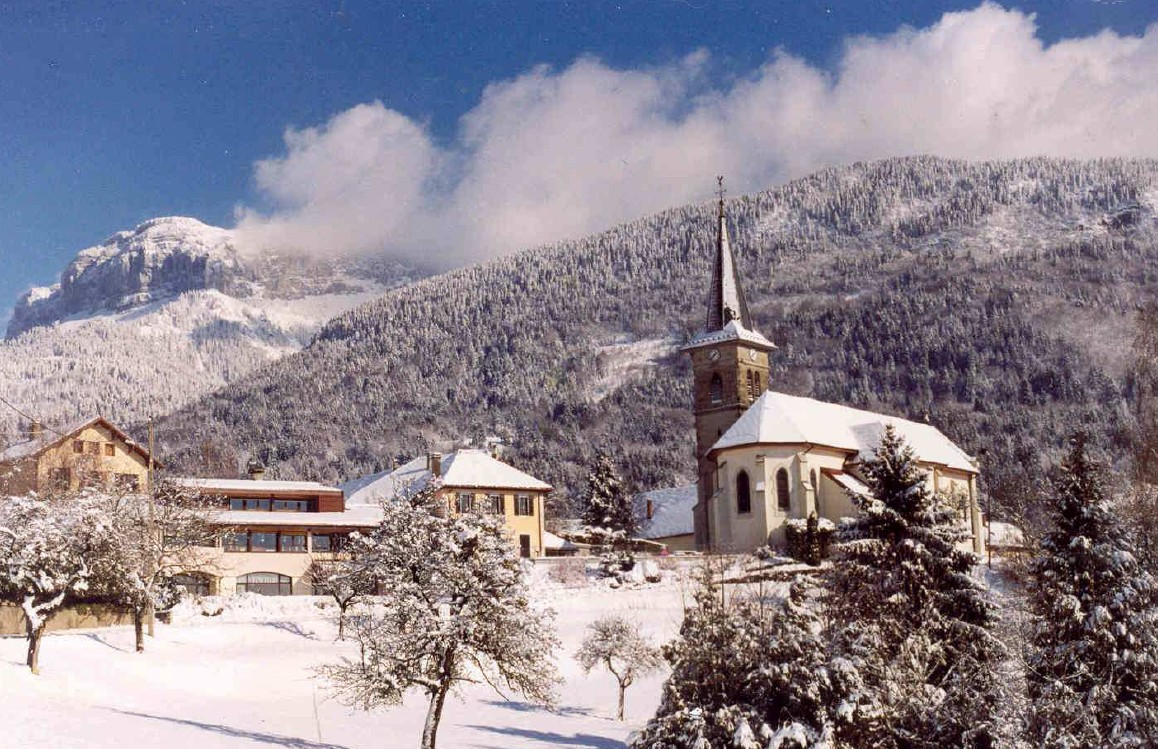 Vue de Nâves-Parmelan sous la neige